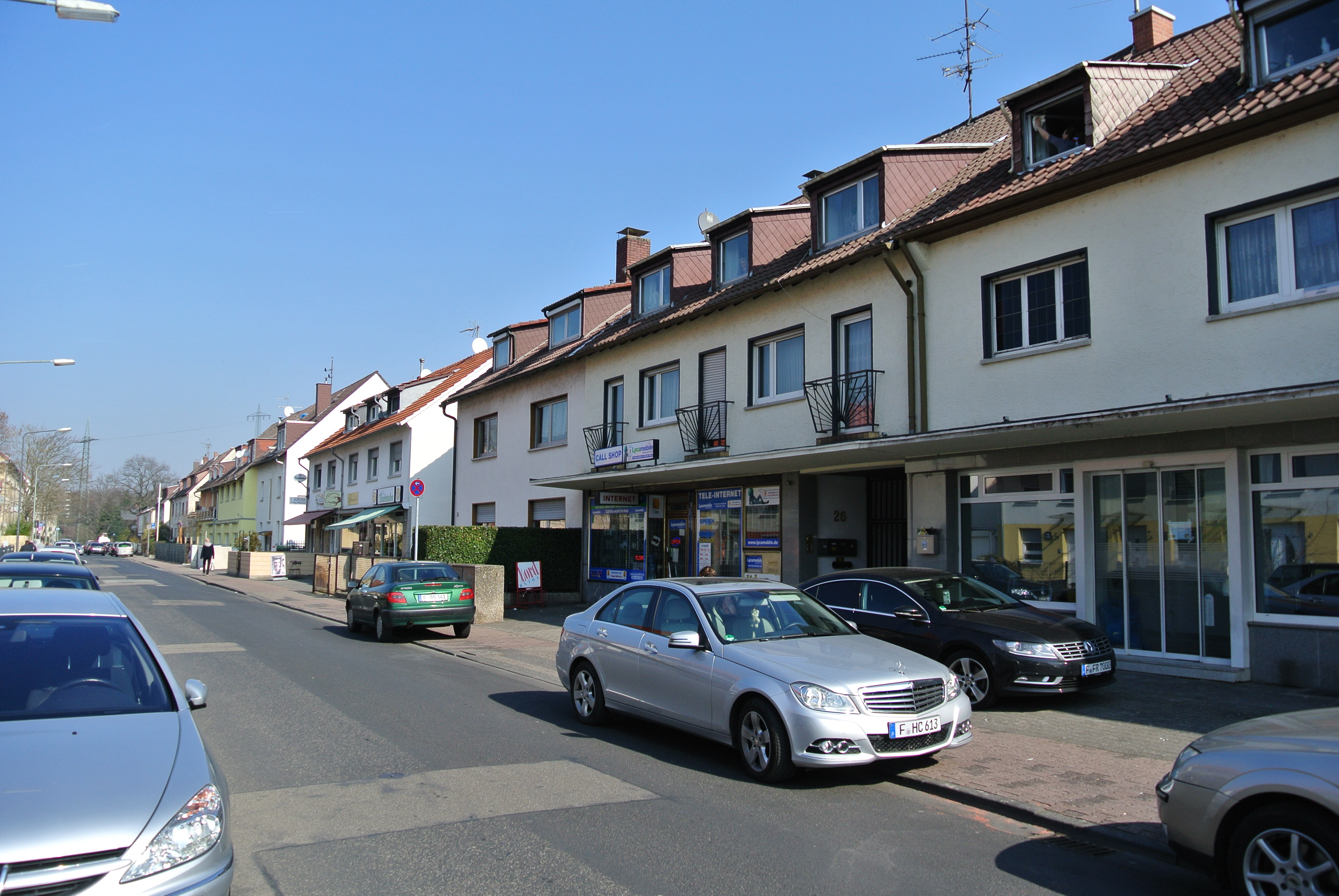 Eduard-Wildermuth-Siedlung in Frankfurt-Griesheim nördlich der Mainzer Landstraße, ab 1950 errichtet, Zum Linnegraben, Ladenzeile